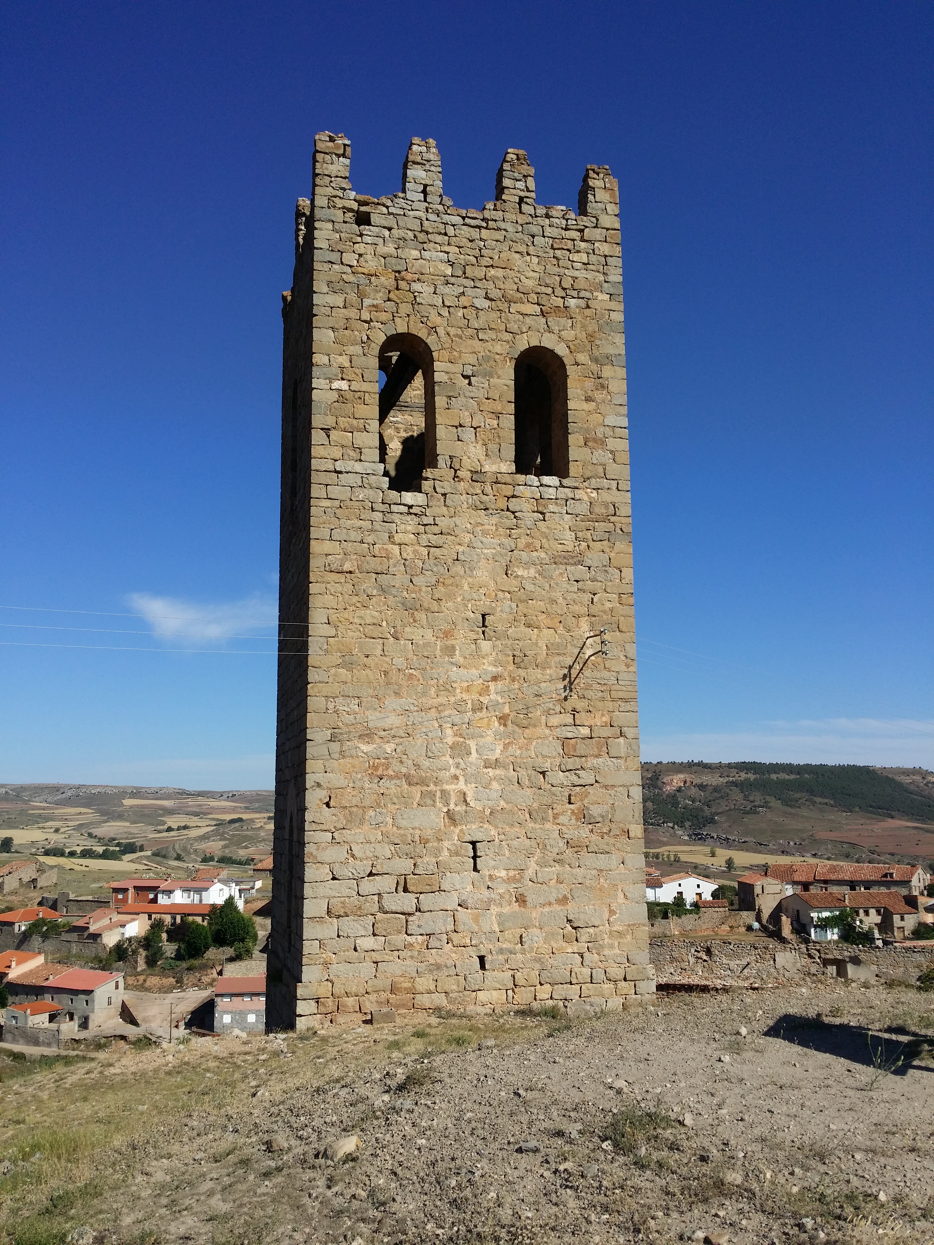 Ababuj. Teruel